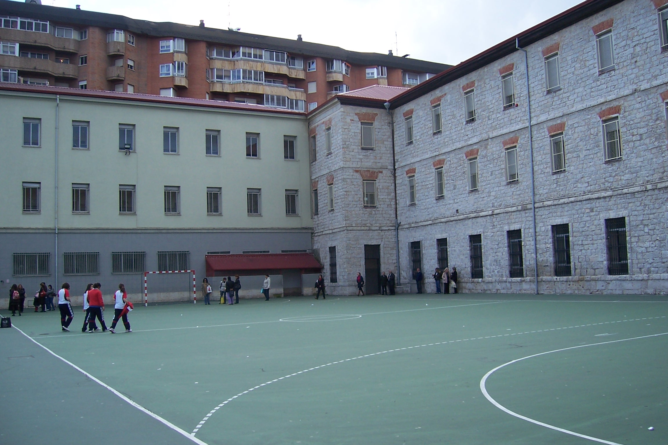 Colegio de San José en Valladolid (España). Instalaciones deportivas en los patios exteriores, junto al edificio principal.